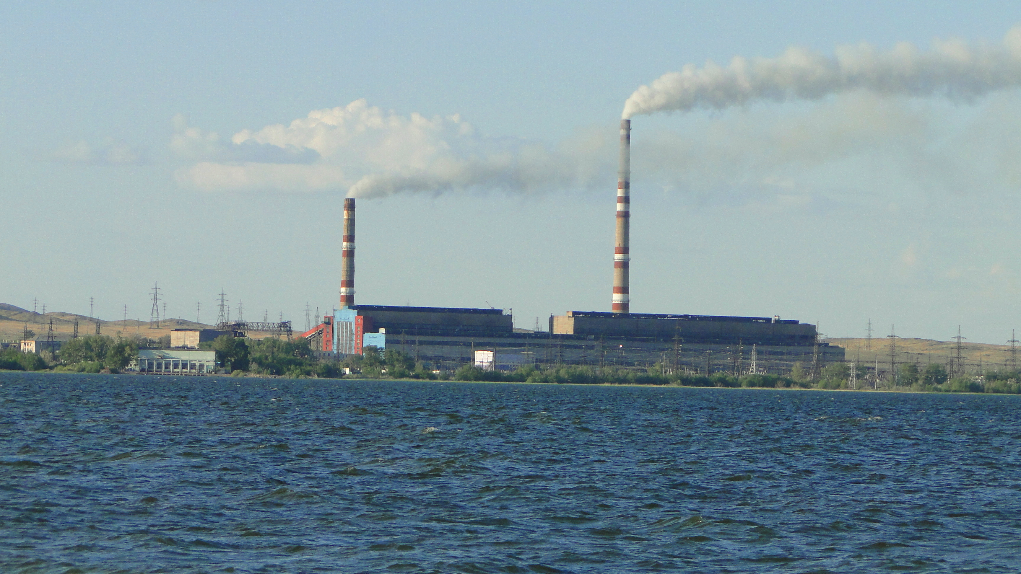 Карагандинская ГРЭС-2 в посёлке Топар